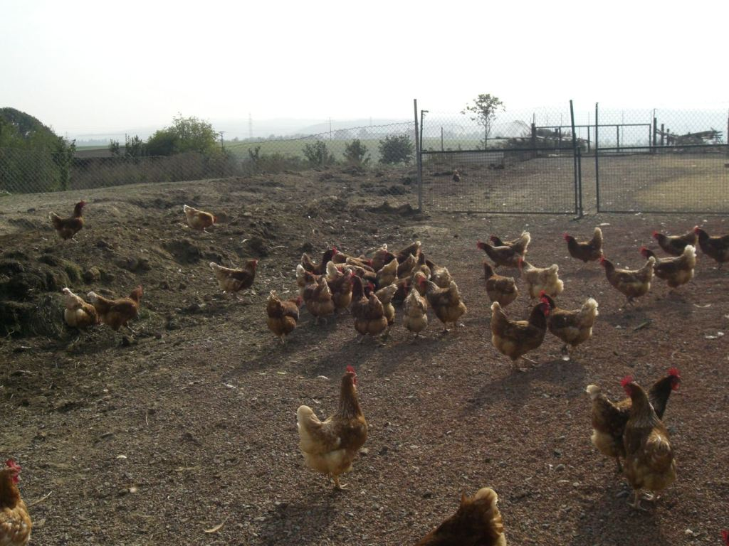 德国耶和华见证人伯特利农场 Niederselters